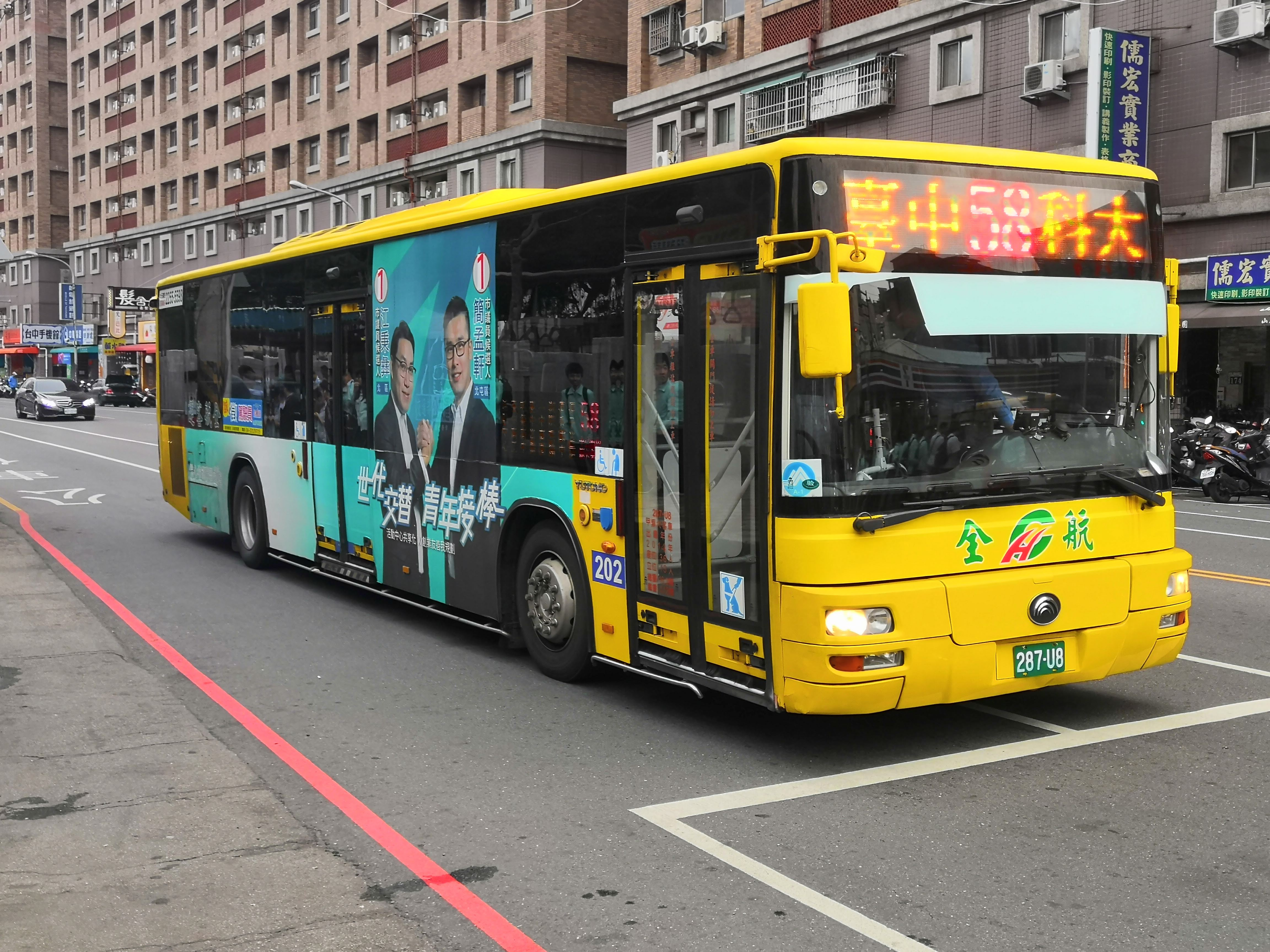 全航客運台中市公車58路 宇通客車ZK6128HG大客車 287U8